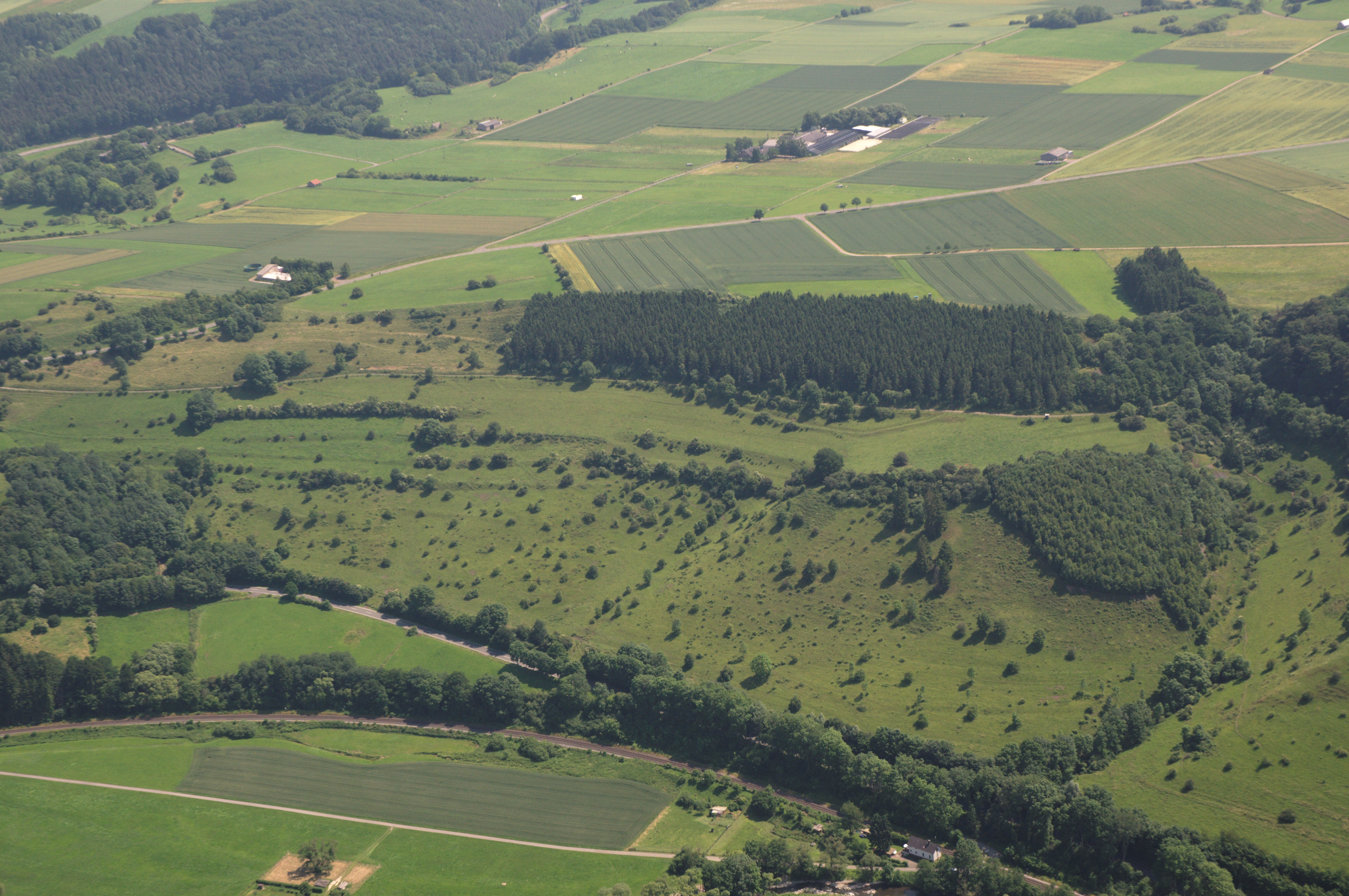 Fotofug Sauerland-Ost: Naturschutzgebiet Auf der Wiemecke (HSK-038), Marsberg.